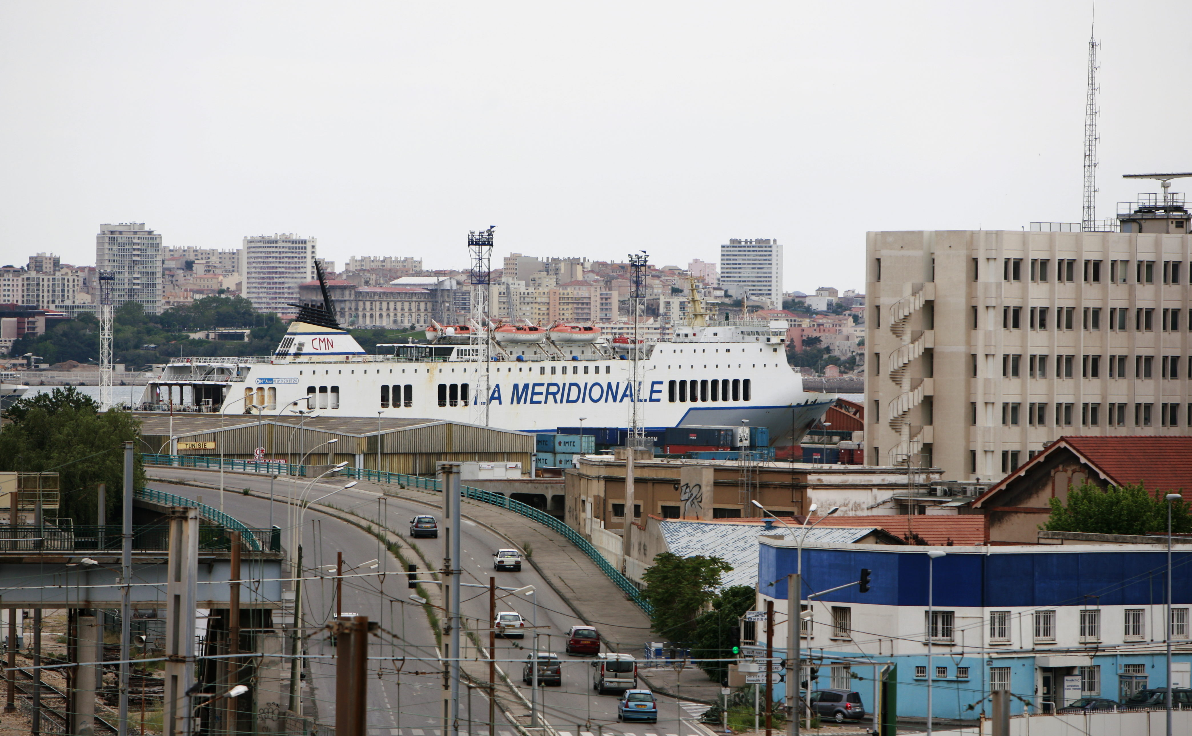 Marseille harbour